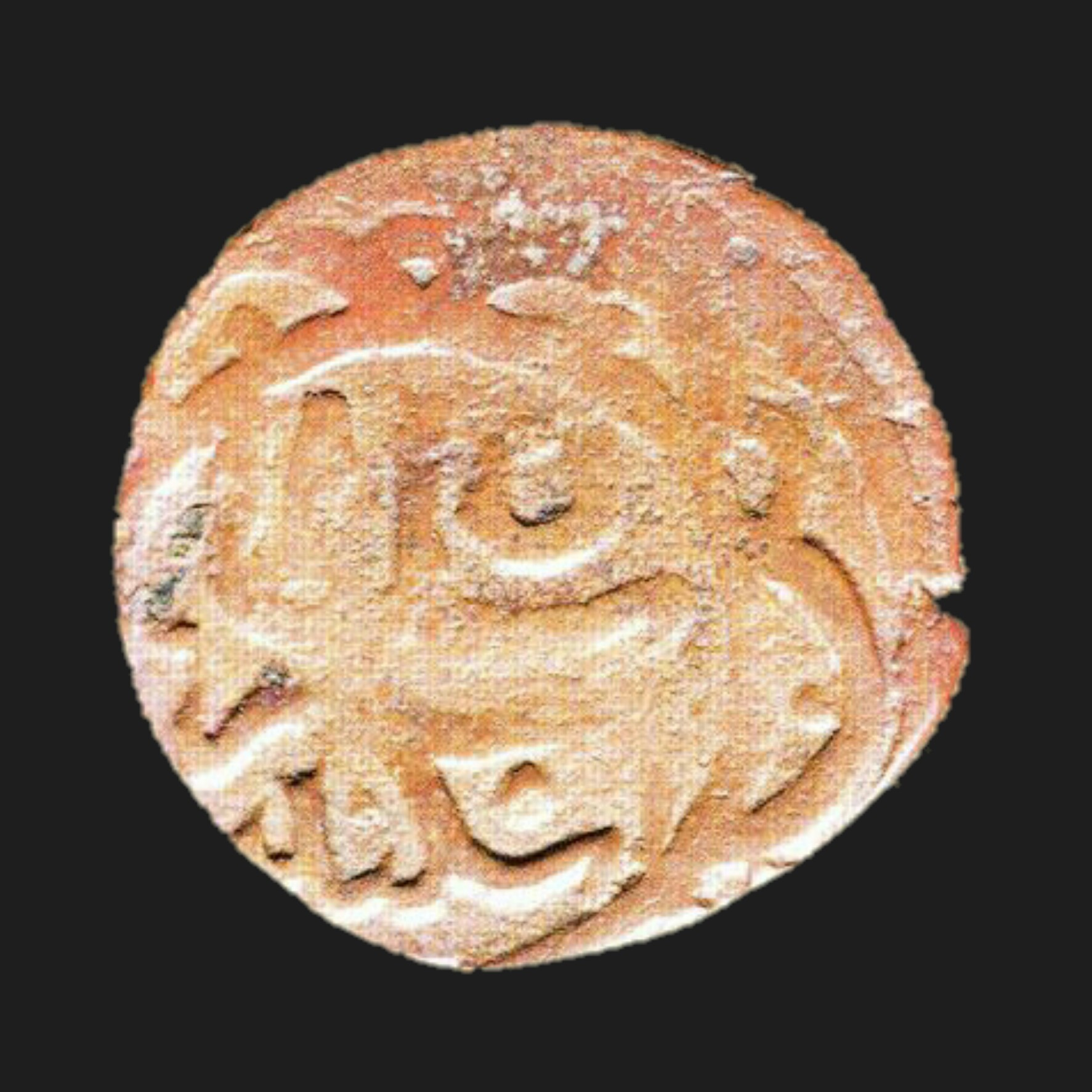 Qaraqoyunlu. İsgəndər, fels, mis